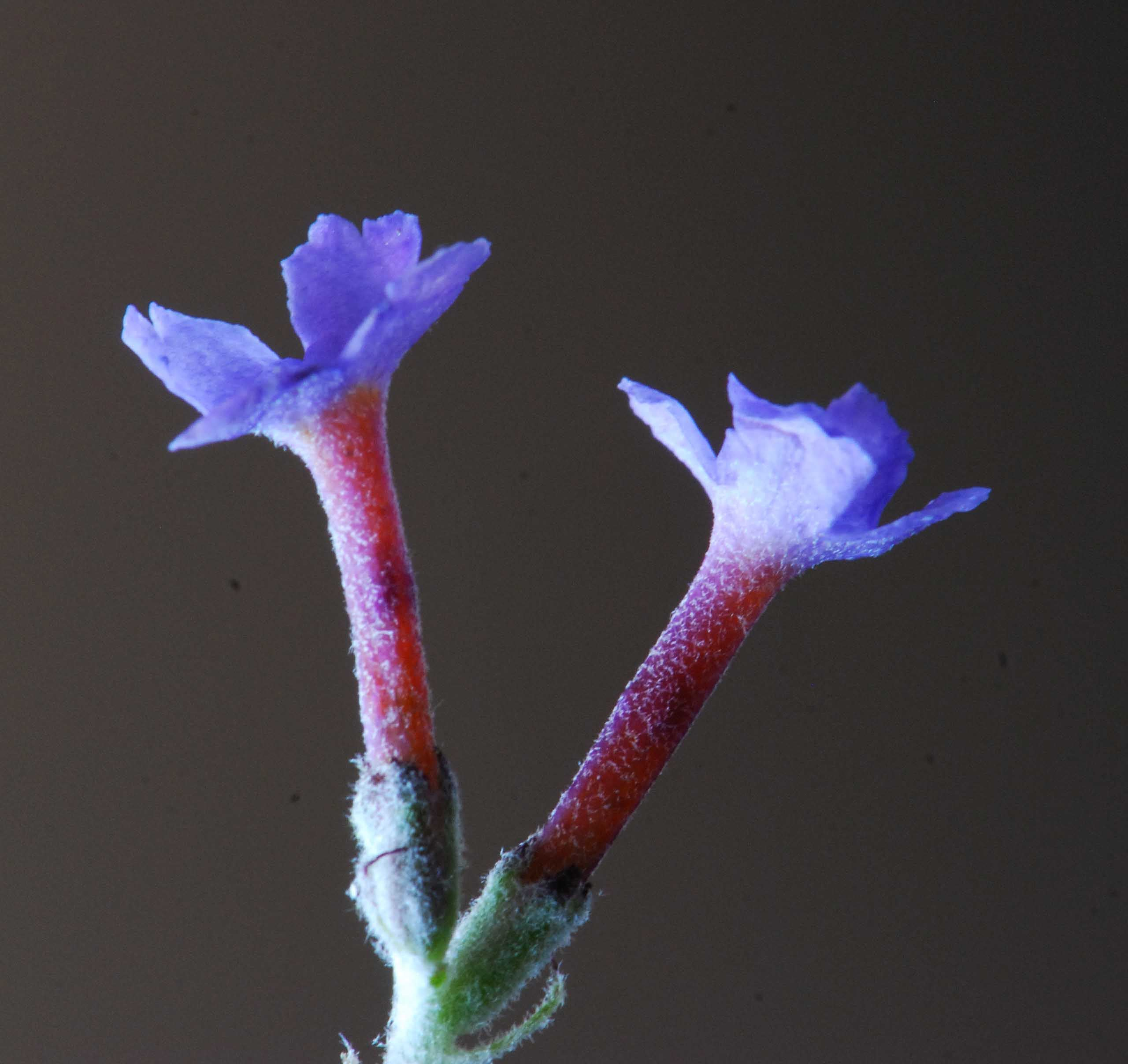 Buddleja davidii x fallowiana, fleurs, Paris